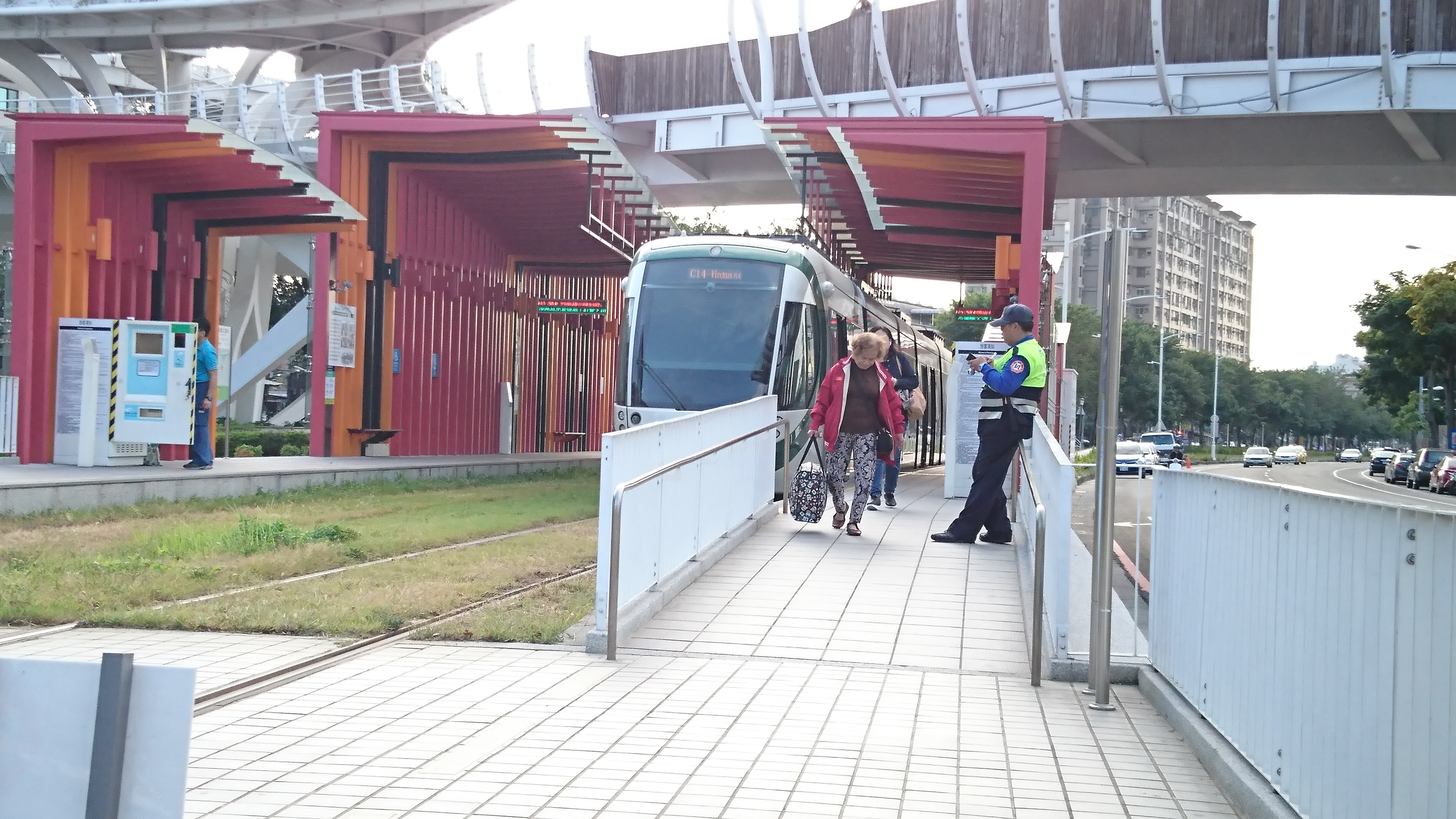 從公車站牌處拍攝停靠前鎮之星站旁的輕軌。